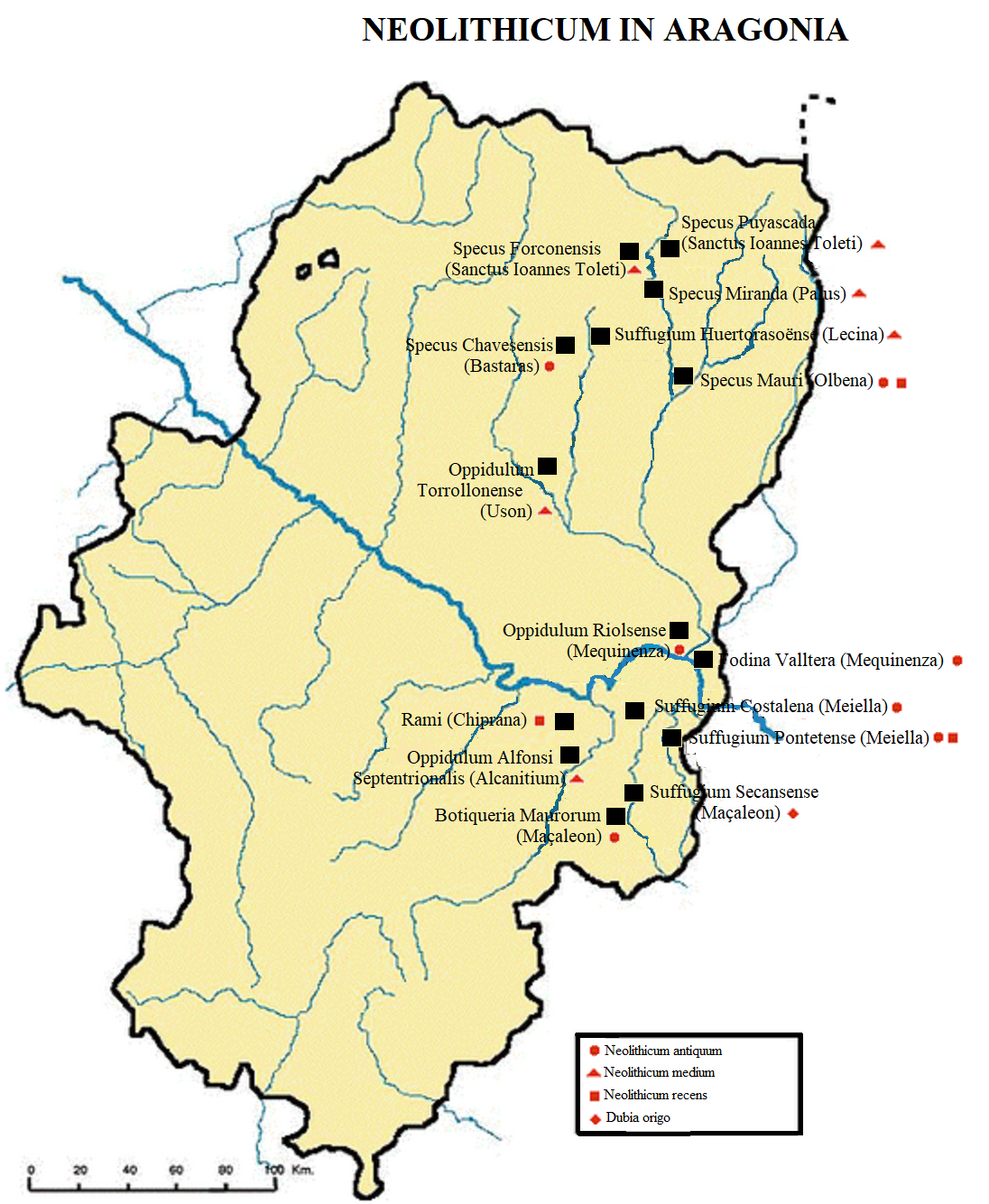 Neolithicum in Aragonia